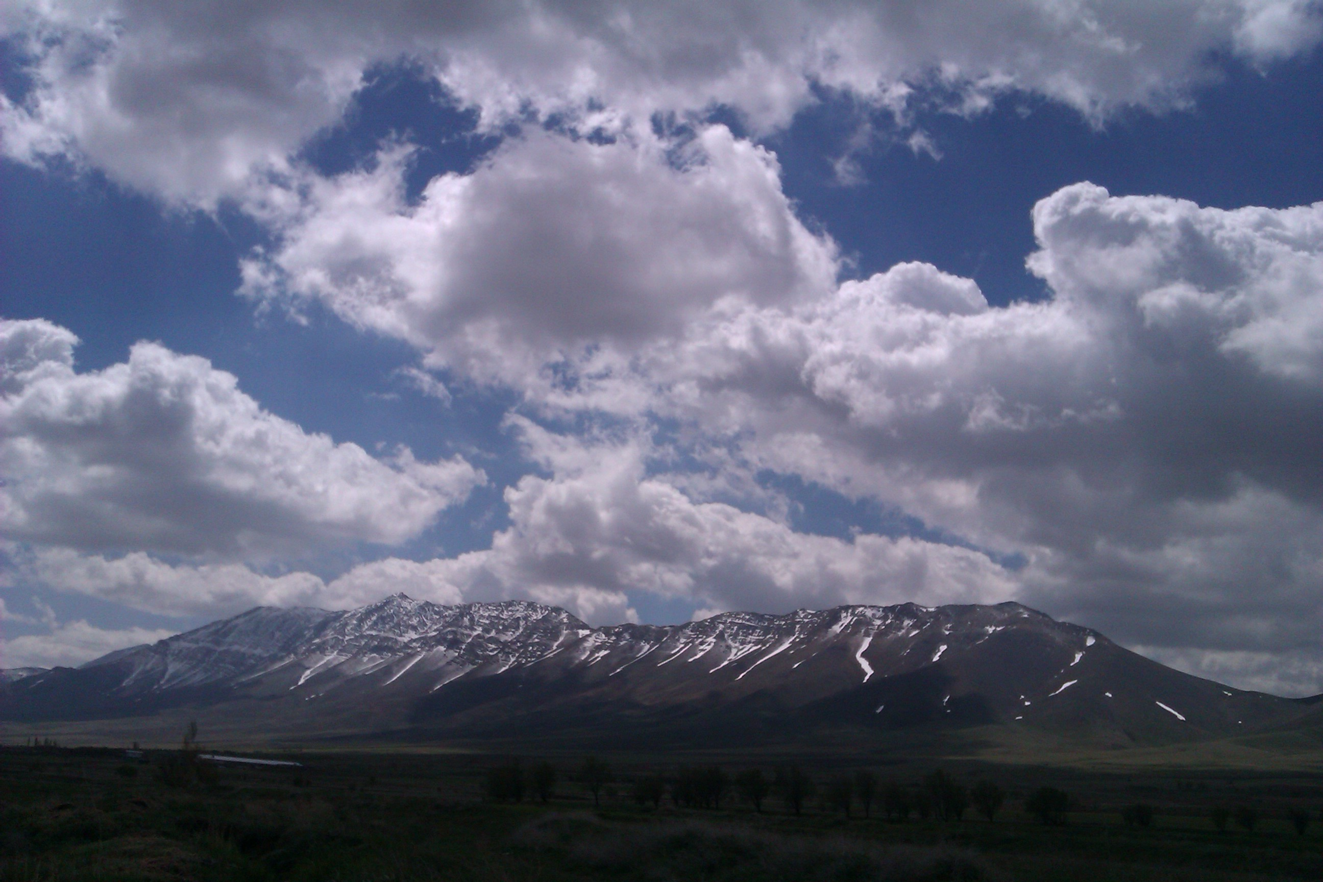 رشته کوههای کمر بسته روستای فرج آباد